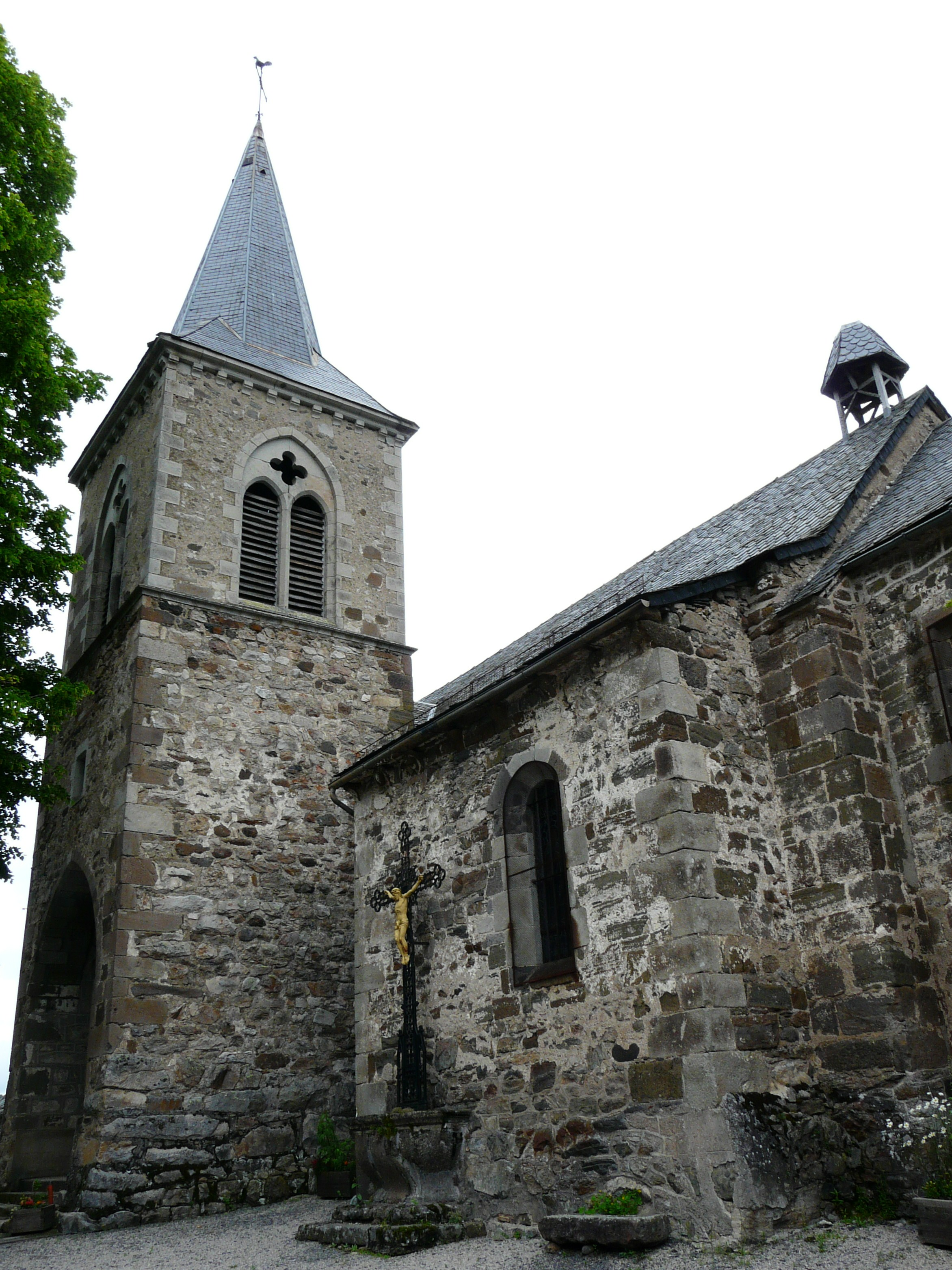 L'église de Marchastel, Cantal, France.